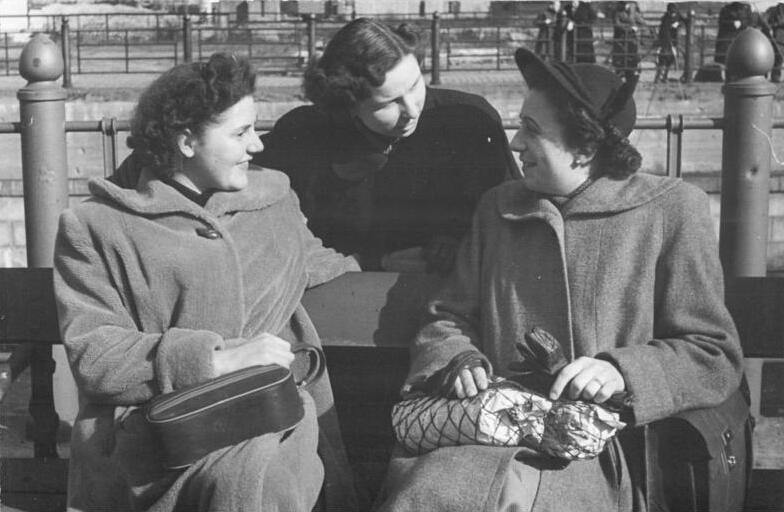 Straßenszene, Frauen im Gespräch Zentralbild Köhler 28.2.1953 Frühling 1953 Plauderstunde in der Frühlingssonne.